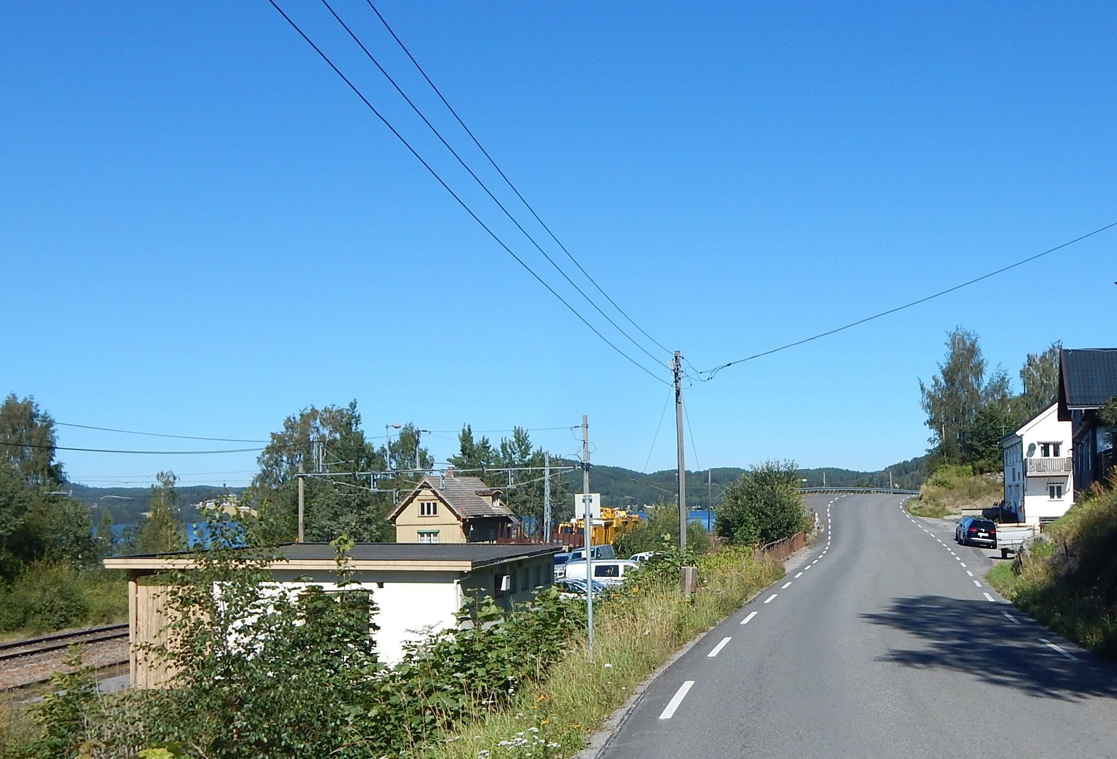 Fylkesvei 1600 (tidl. 229) ved Espa stasjon